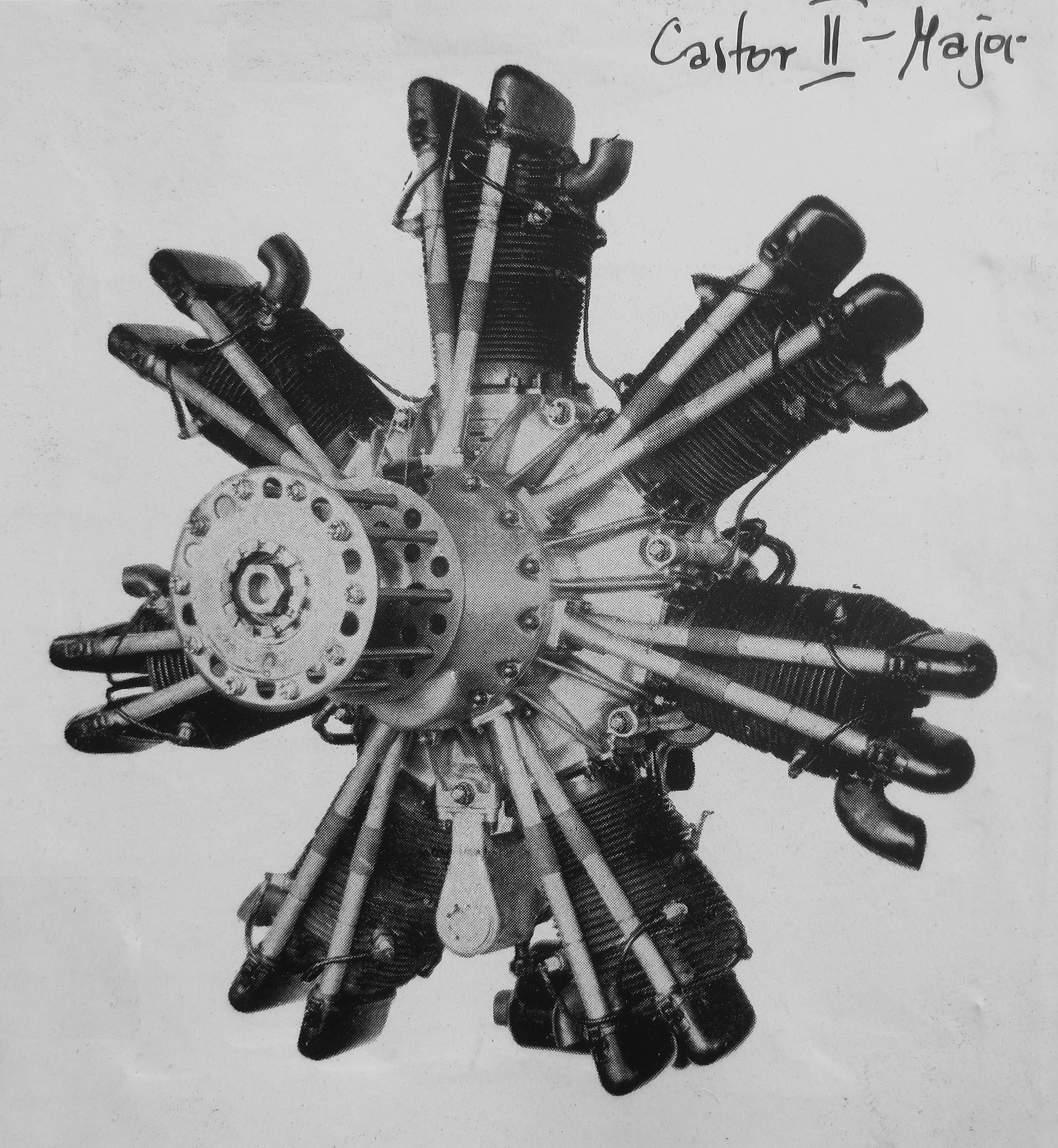 letecký motor Walter Castor II (1932)